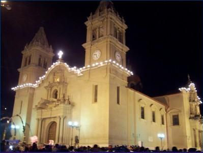 Tarma Catedral en la noche